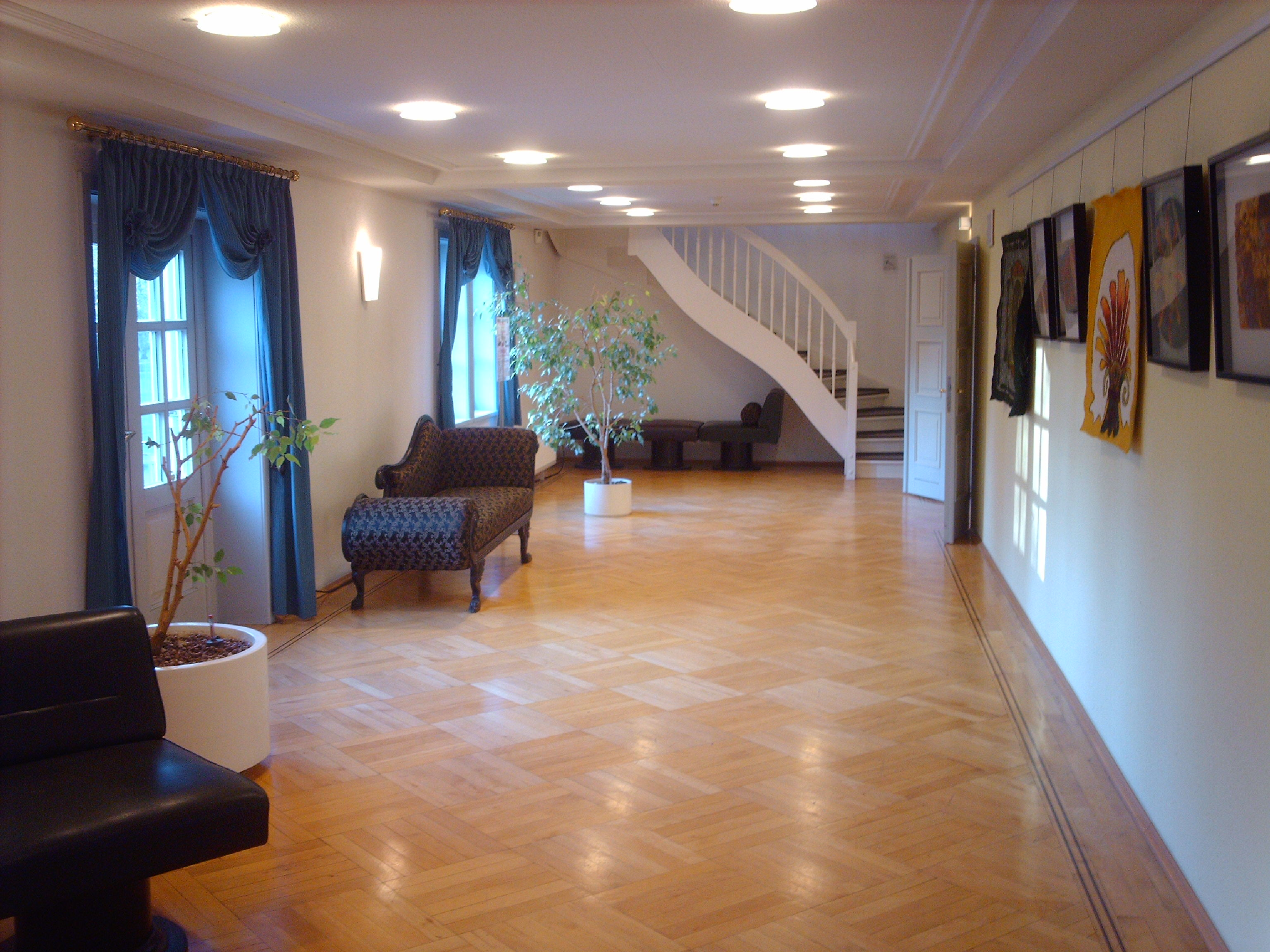 Vorraum im Schloßtheater Arnstadt